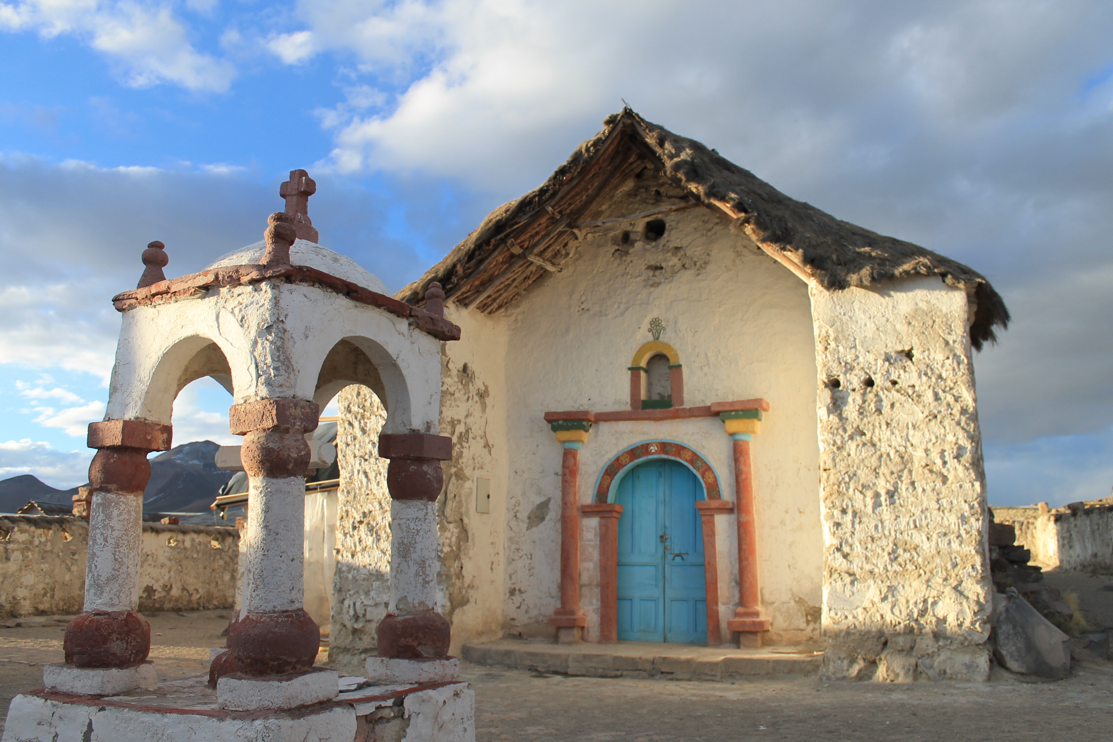 Iglesia de Parinacota This is a photo of a national monument in Chile: 535